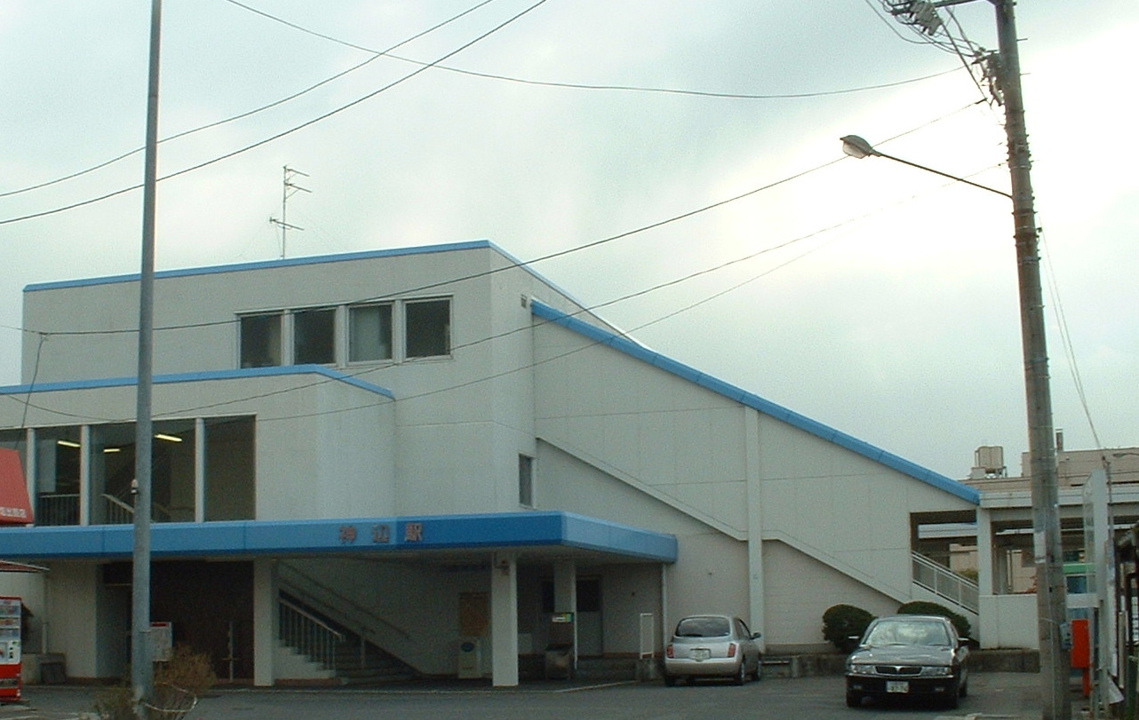 神辺駅（2006年3月21日に投稿者が撮影)